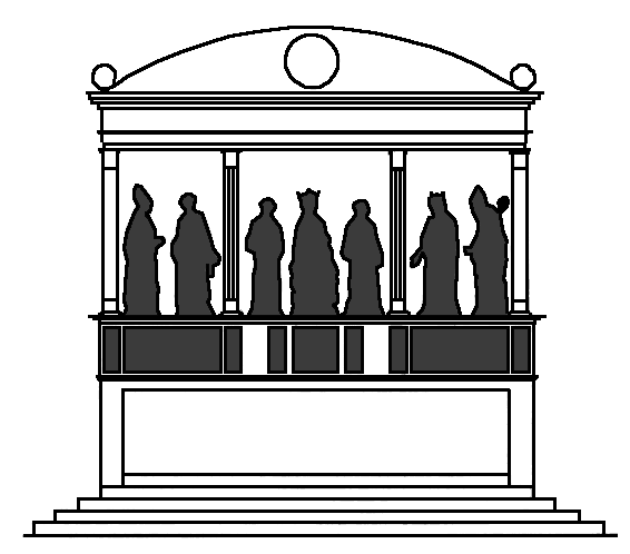 Altare del santo di padova, schema.png